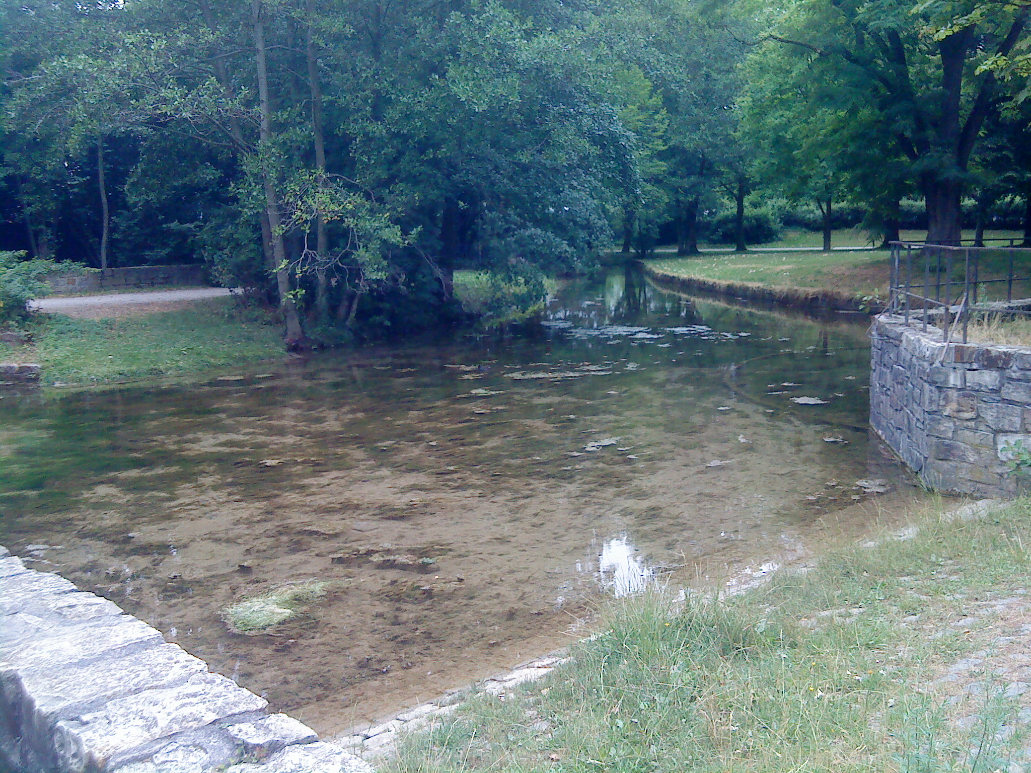 Die Quelle der Masperpader